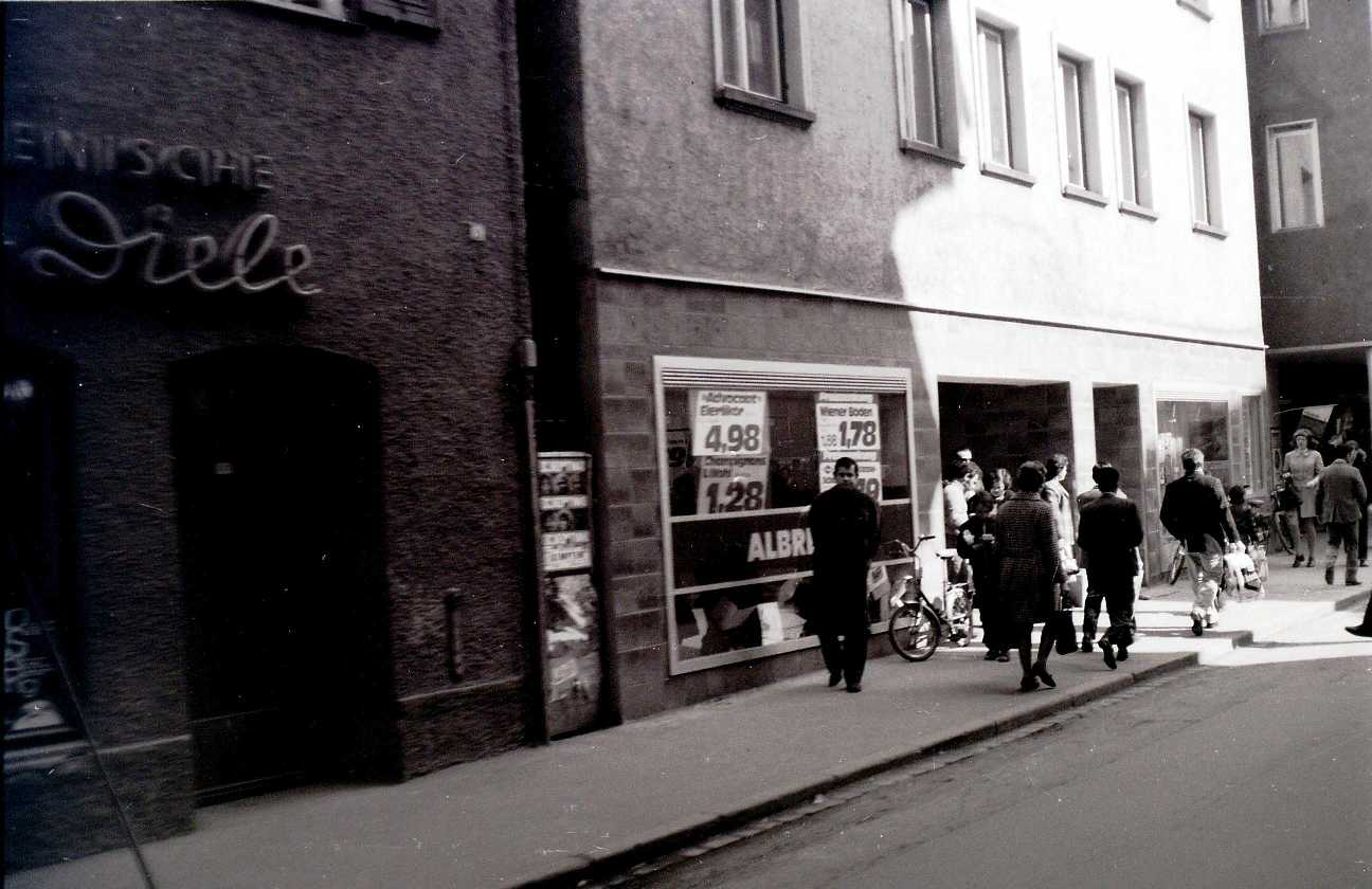 Ein ALDI-Geschäft in der Kalchstraße in der Memminger Innenstadt